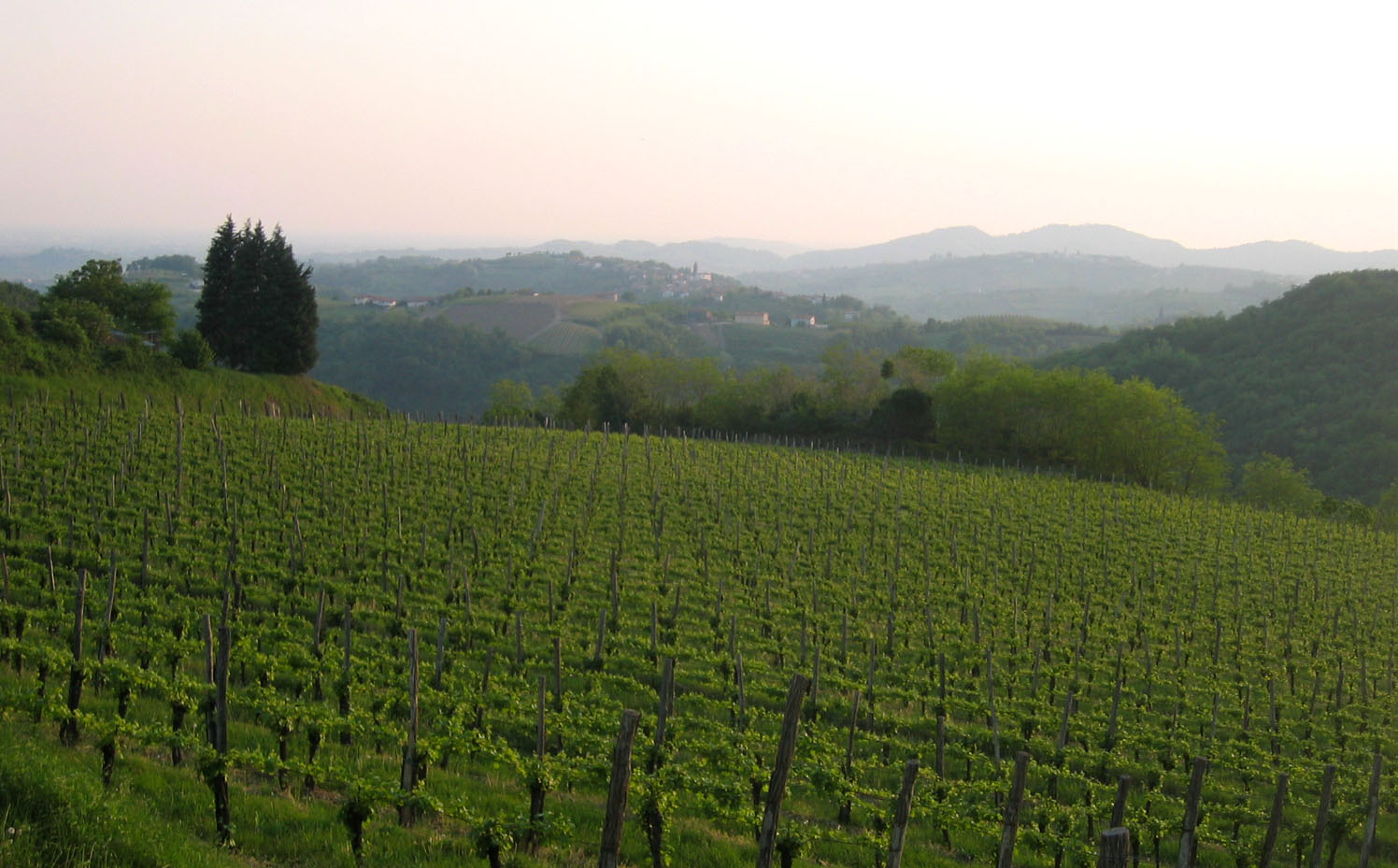 Goriška Brda, wine region, Slovenia